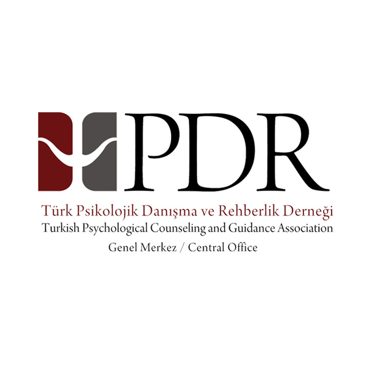 Türk PDR-Der Logosu